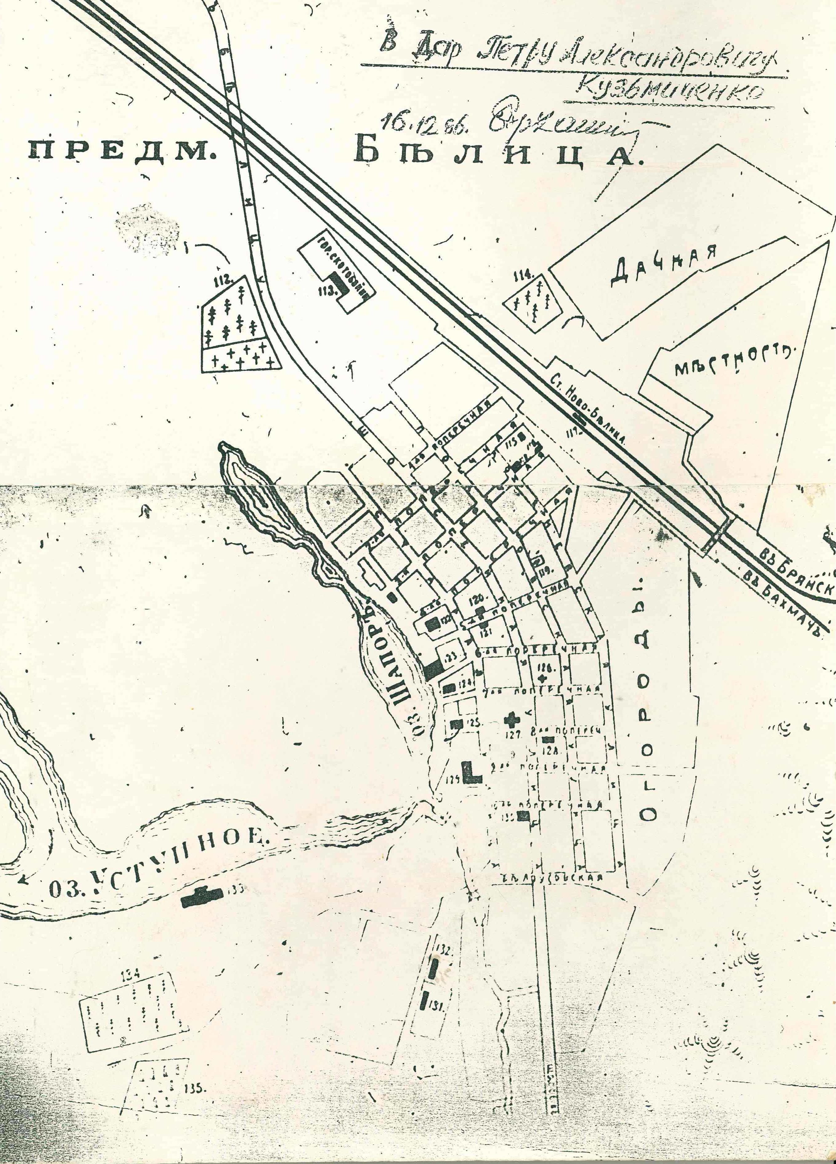 Беларуская (тарашкевіца): Гомель (Homiel), плян места